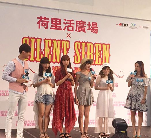 粵語: 嚴崇天擔任荷里活廣場活動司儀